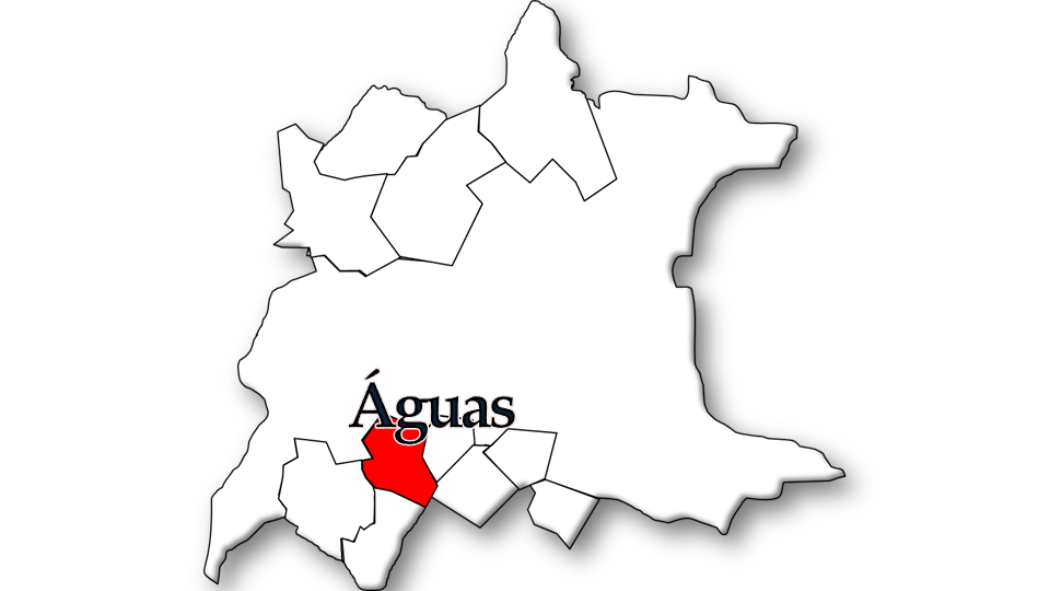 População